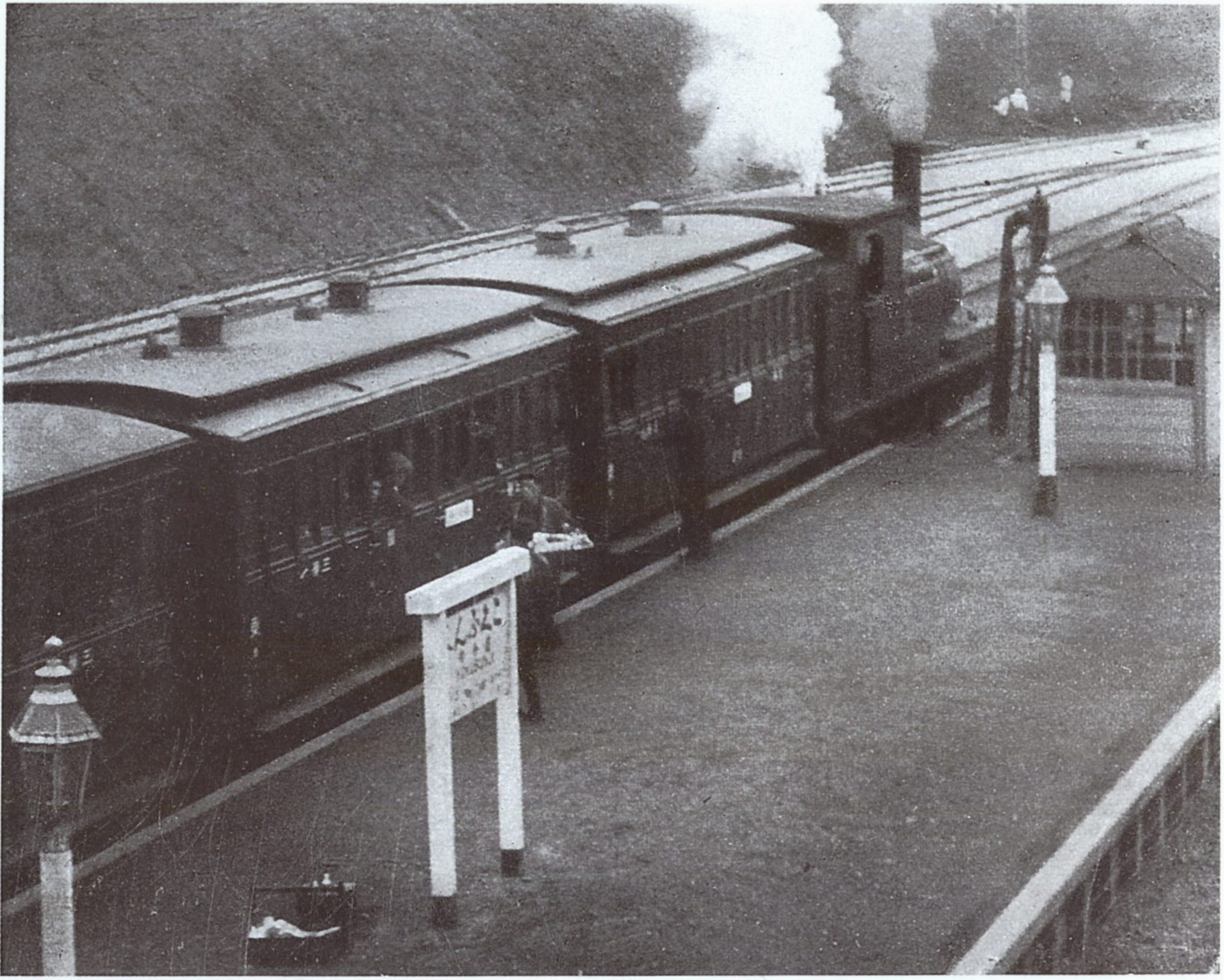 大正4年4月21日の中央線国分寺駅。陸橋からの撮影。P81-82に詳細が記されている。